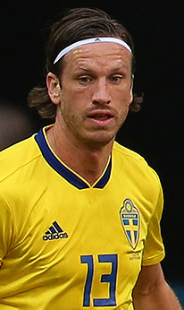 Сборная Швеции зрелищно вышла в четвертьфинал ЧМ-2018